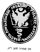 Беларуская (тарашкевіца): Пячатка Пружанскага магістрату